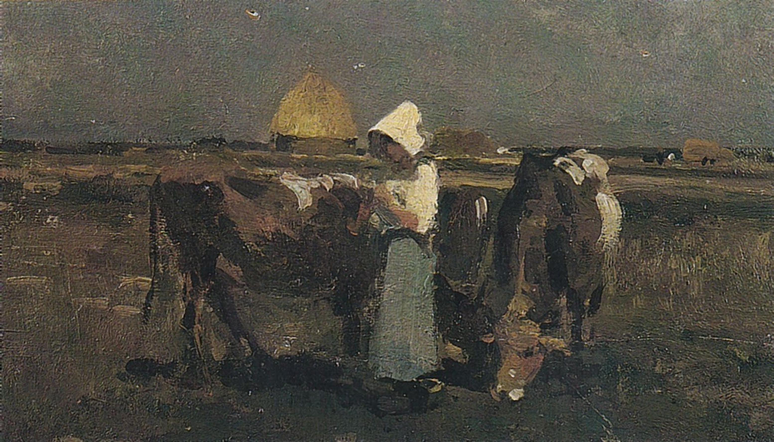 Ciobăniță la Barbizon - Muzeul Colecțiilor de Artă din București